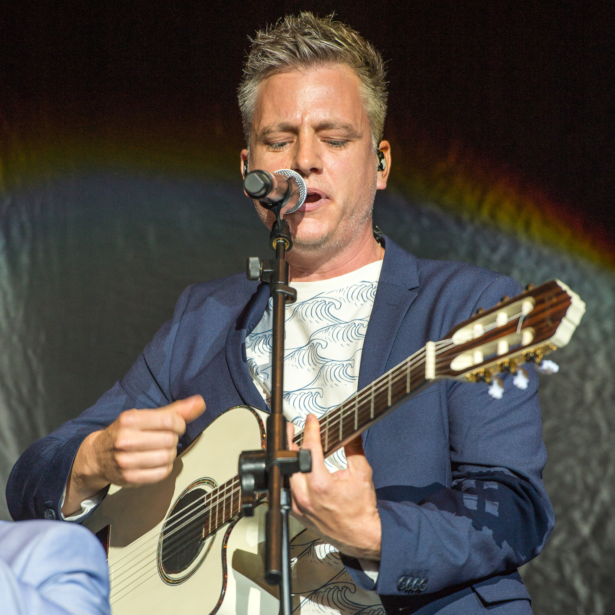 ARGO-Konzerte,Beck's Park Stage,Dokter Renz,Festival,Fettes Brot,Konzert,Livekonzert,Livemusik,Martin Vandreier,Musik,RiP,Rock im Park 2016